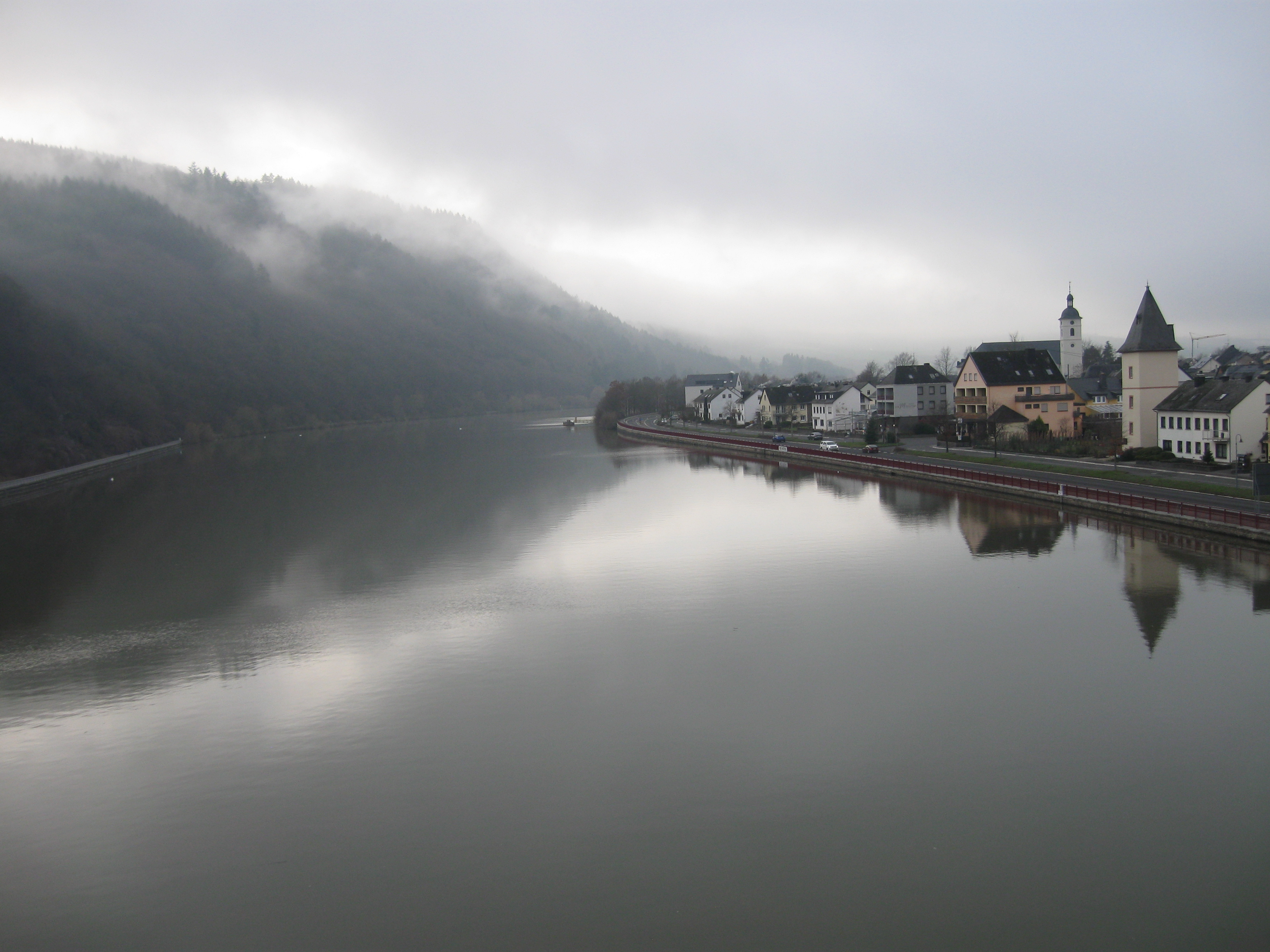 Blick von der Mehringer Moselbrücke nach Osten im Winter 2018